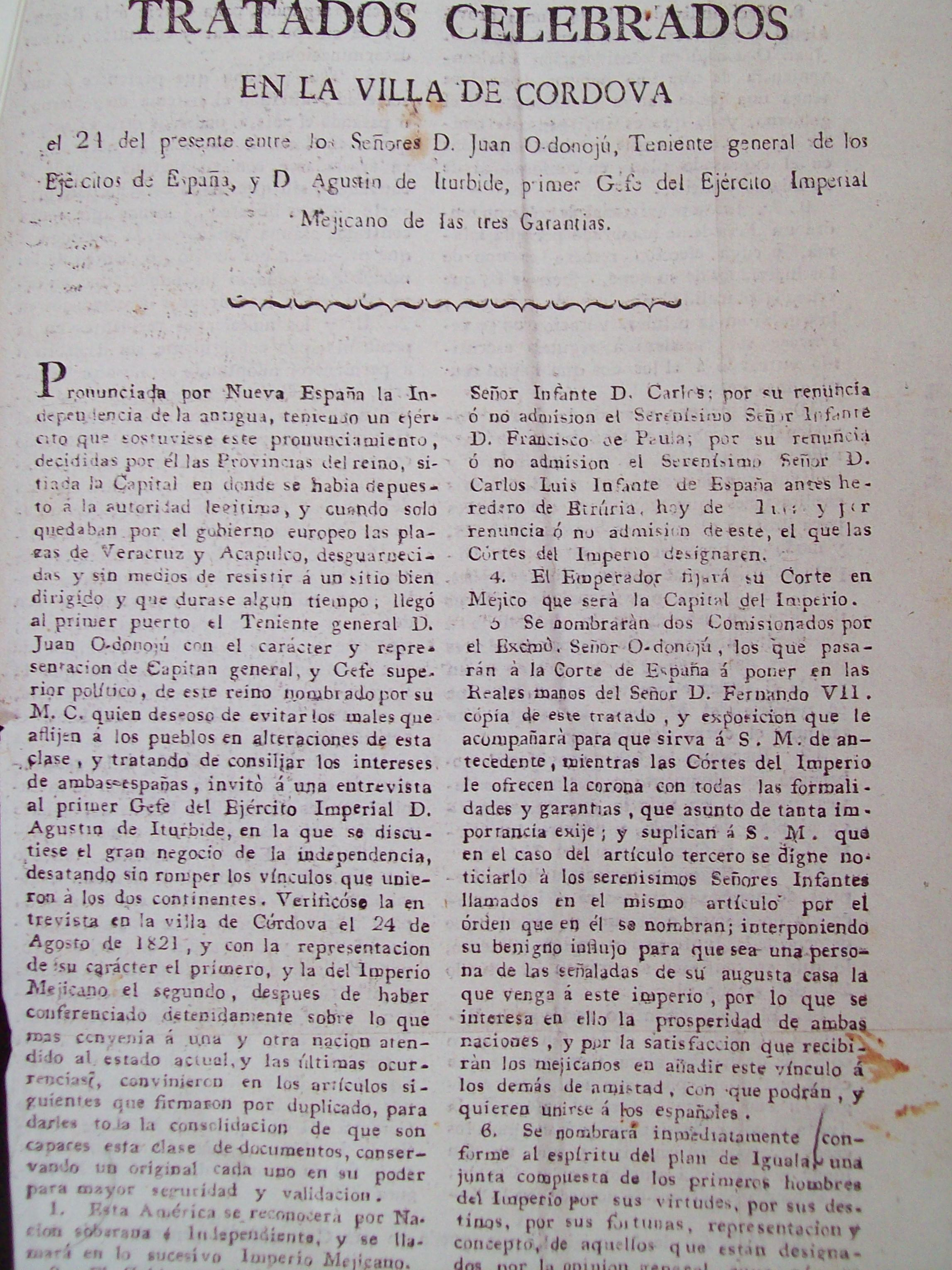 Tratados de Córdoba. Versión impresa de los firmados el 24 de agosto de 1821. Archivo General de la Nación de México. Memoria de las revoluciones de México, tomo 5, 2009. ISBN 978-607-7748-04-5